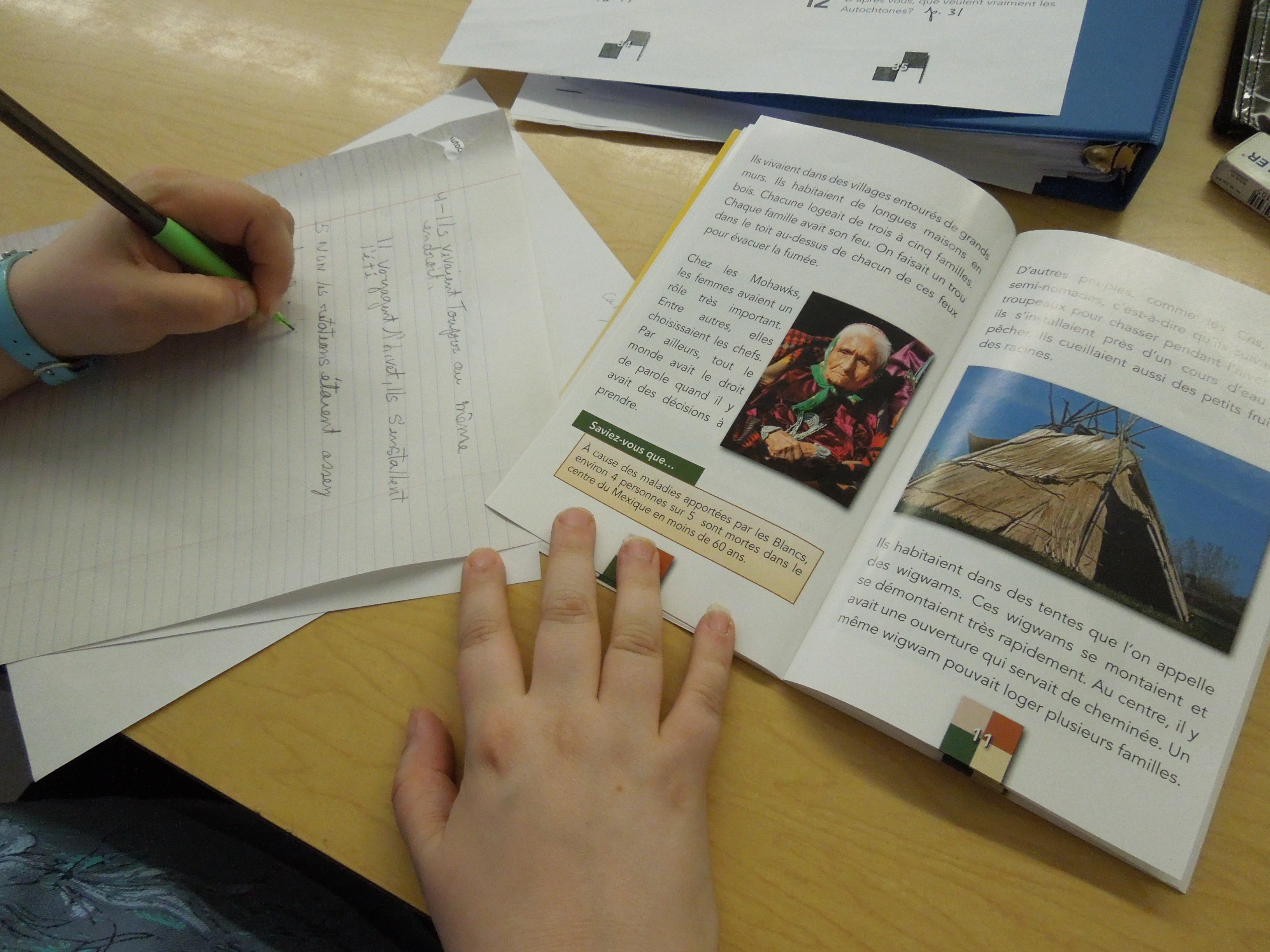 Participante à un atelier d'éducation populaire à Pointe-Saint-Charles, Montréal.